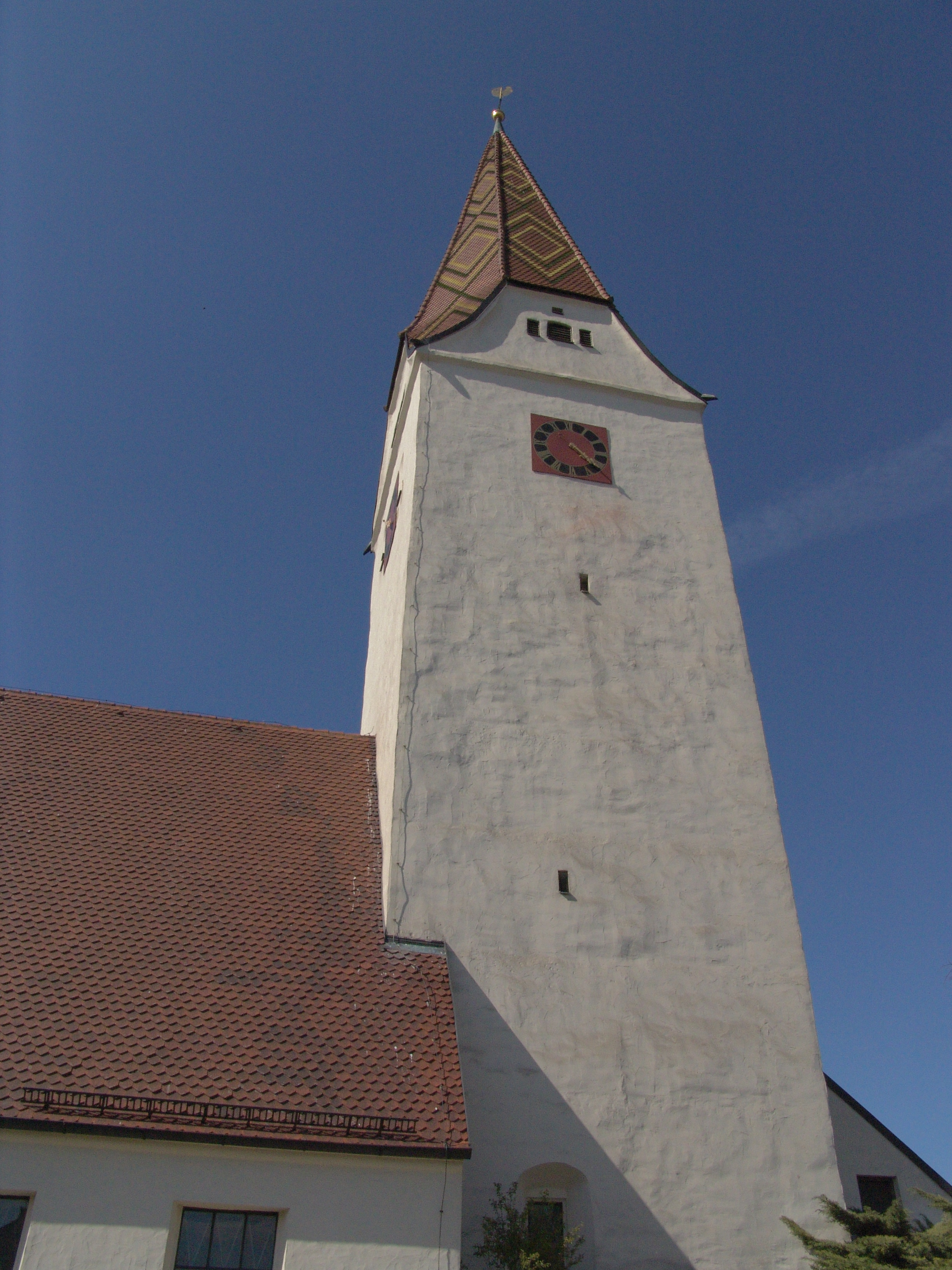 evang.-luth. Kirche St. Stephanus in Alerheim